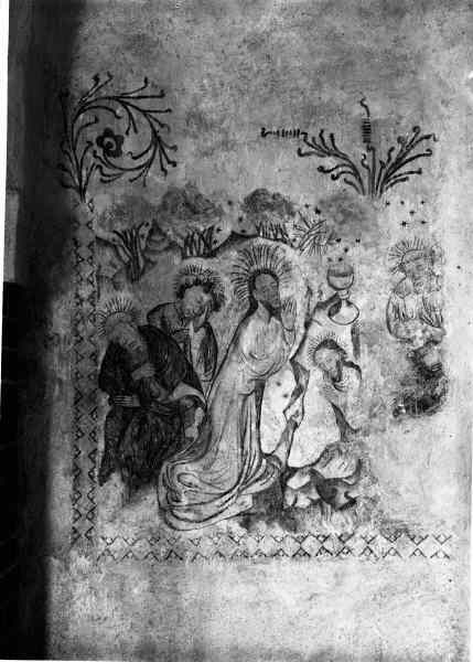 Kalkmålning, omkring 1430. Detalj. Kategori: (03) KalkmålningarKalkmålning, omkring 1430. Detalj.